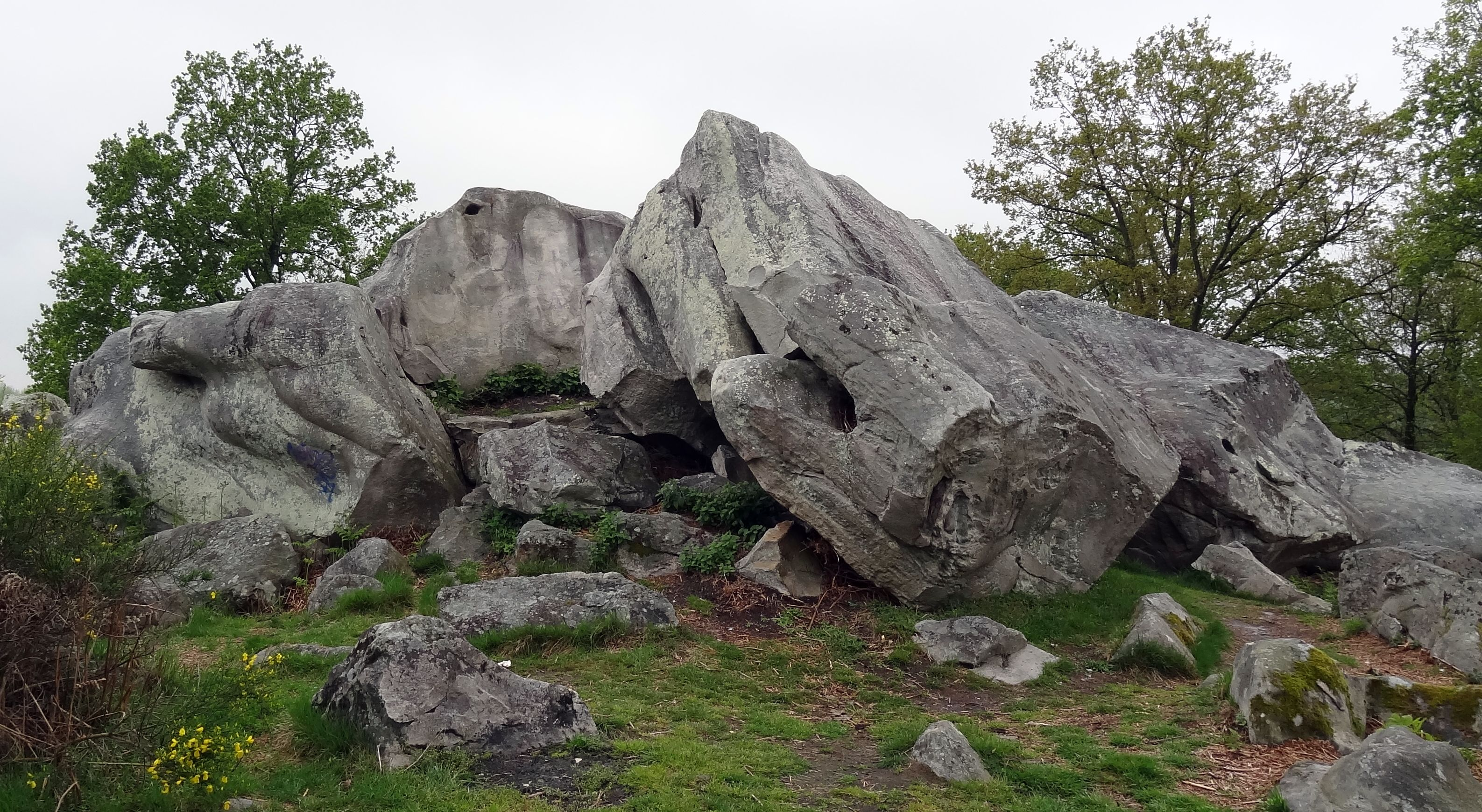 La Hottée de Gargantua (Molinchart), en France.